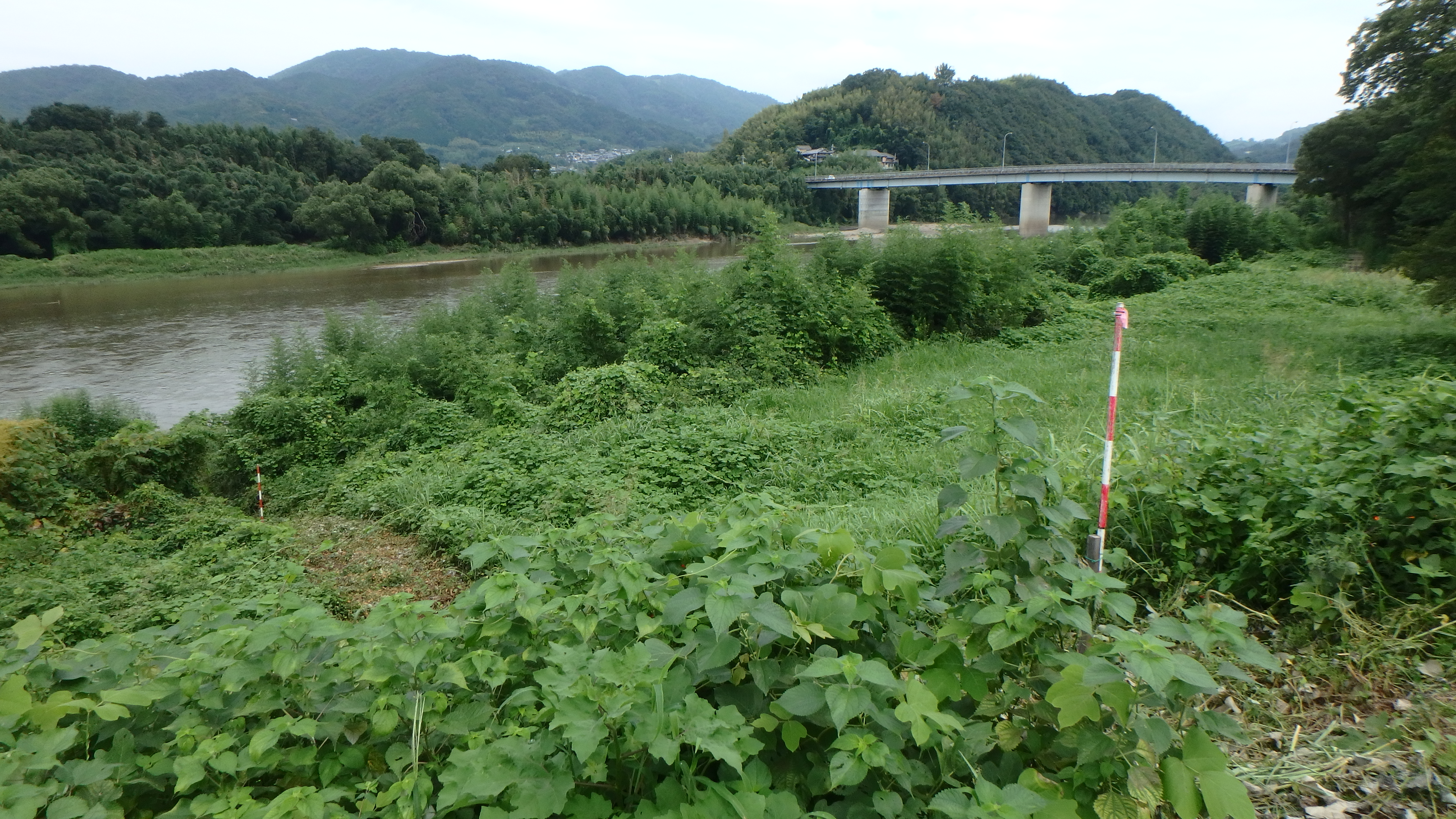 木津川筋六カ浜であった加茂浜の跡地